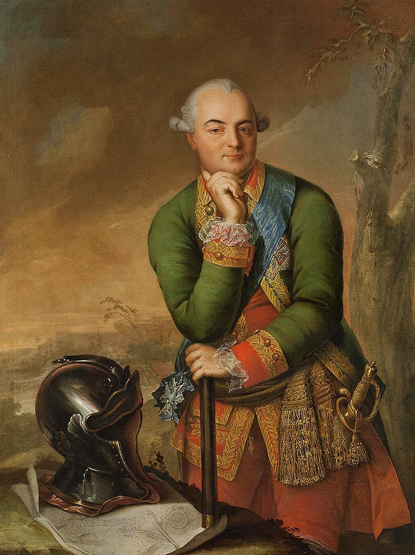 Александр Ильич Бибиков (1729—1774), государственный и военный деятель, генерал-аншеф.